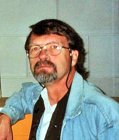 Peter de Zwaan Copyright foto: R.G.H. Schenk